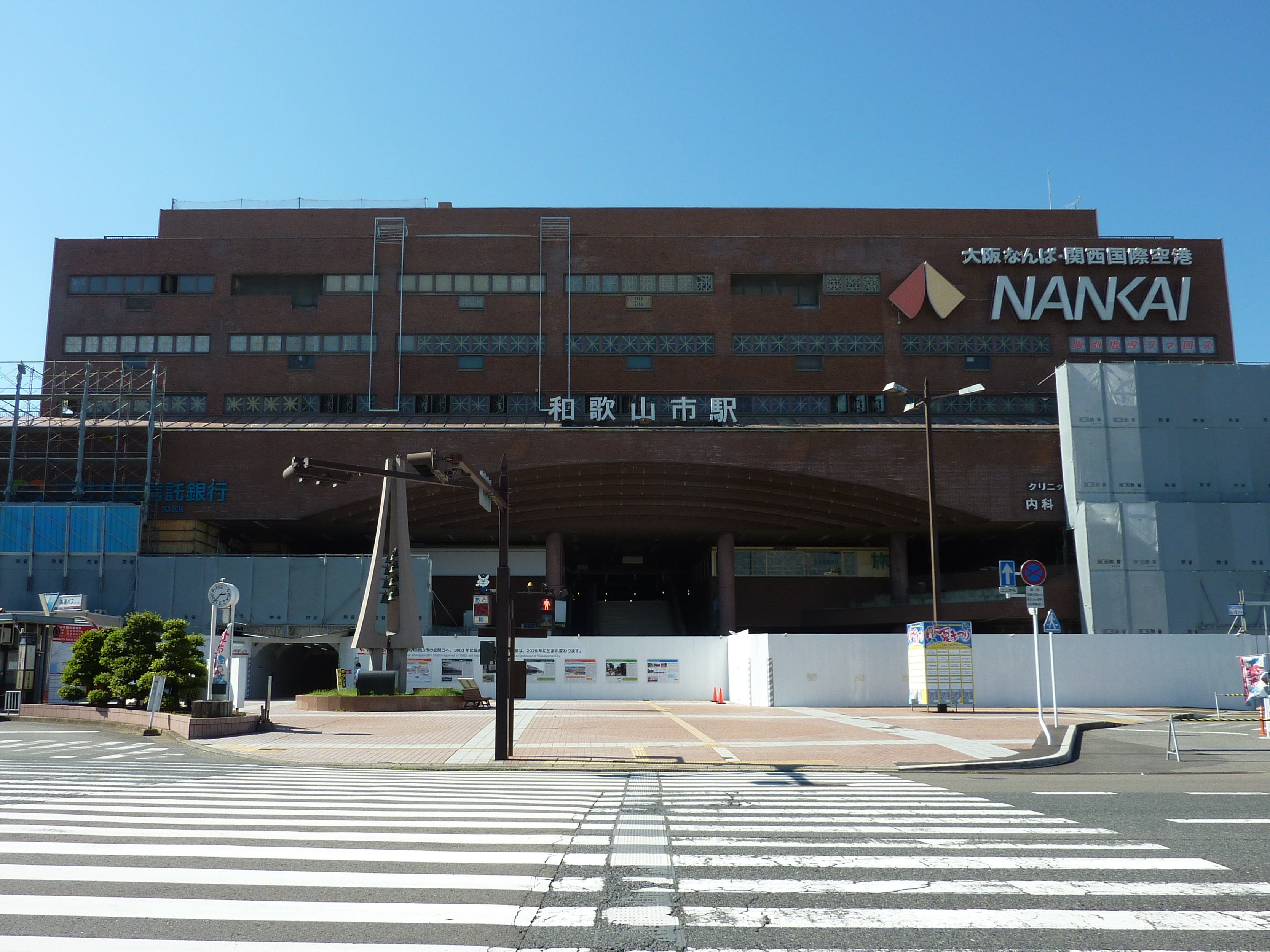 南海和歌山市駅（2017年9月8日撮影）